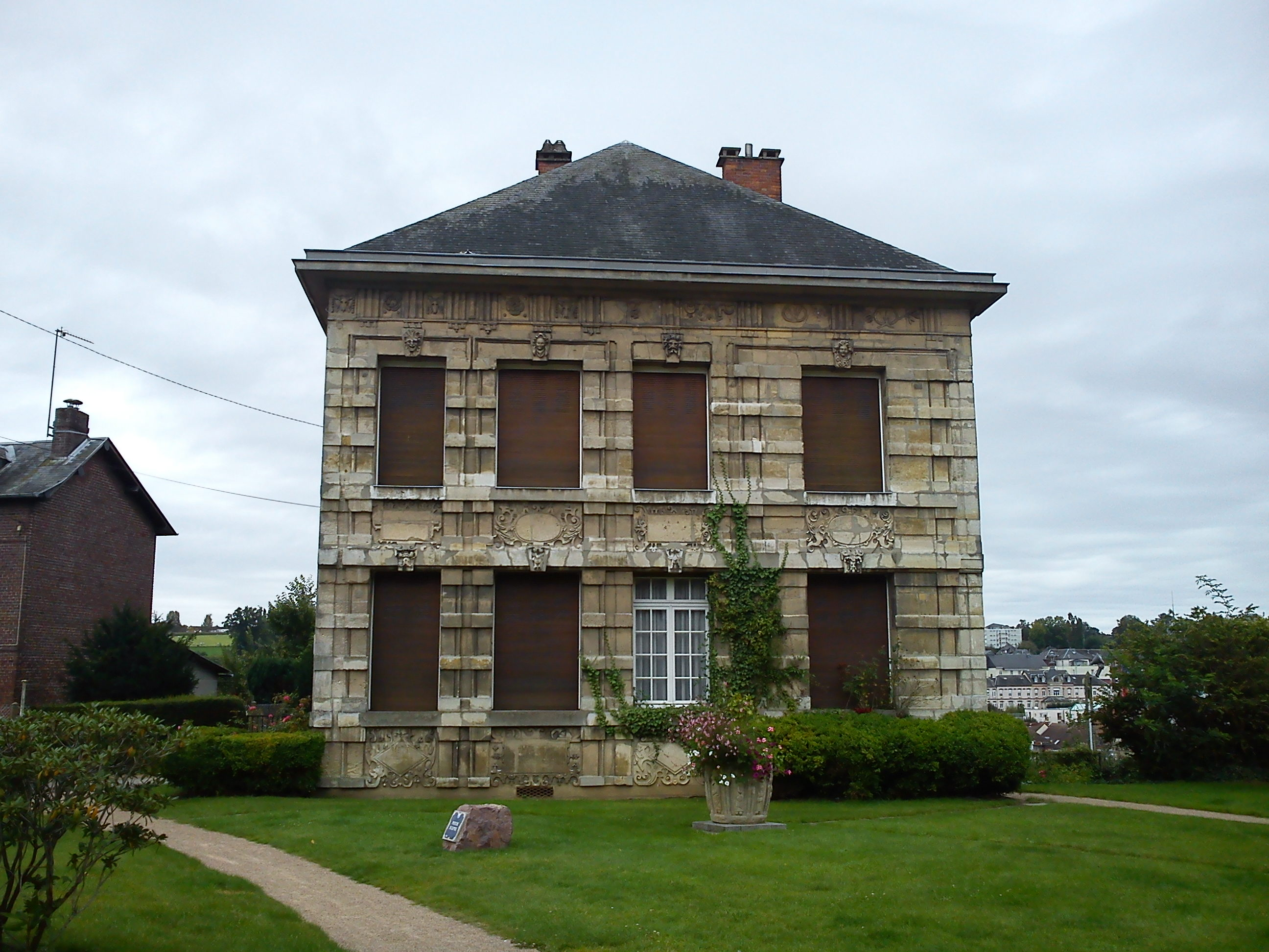 Entrée et sa façade .